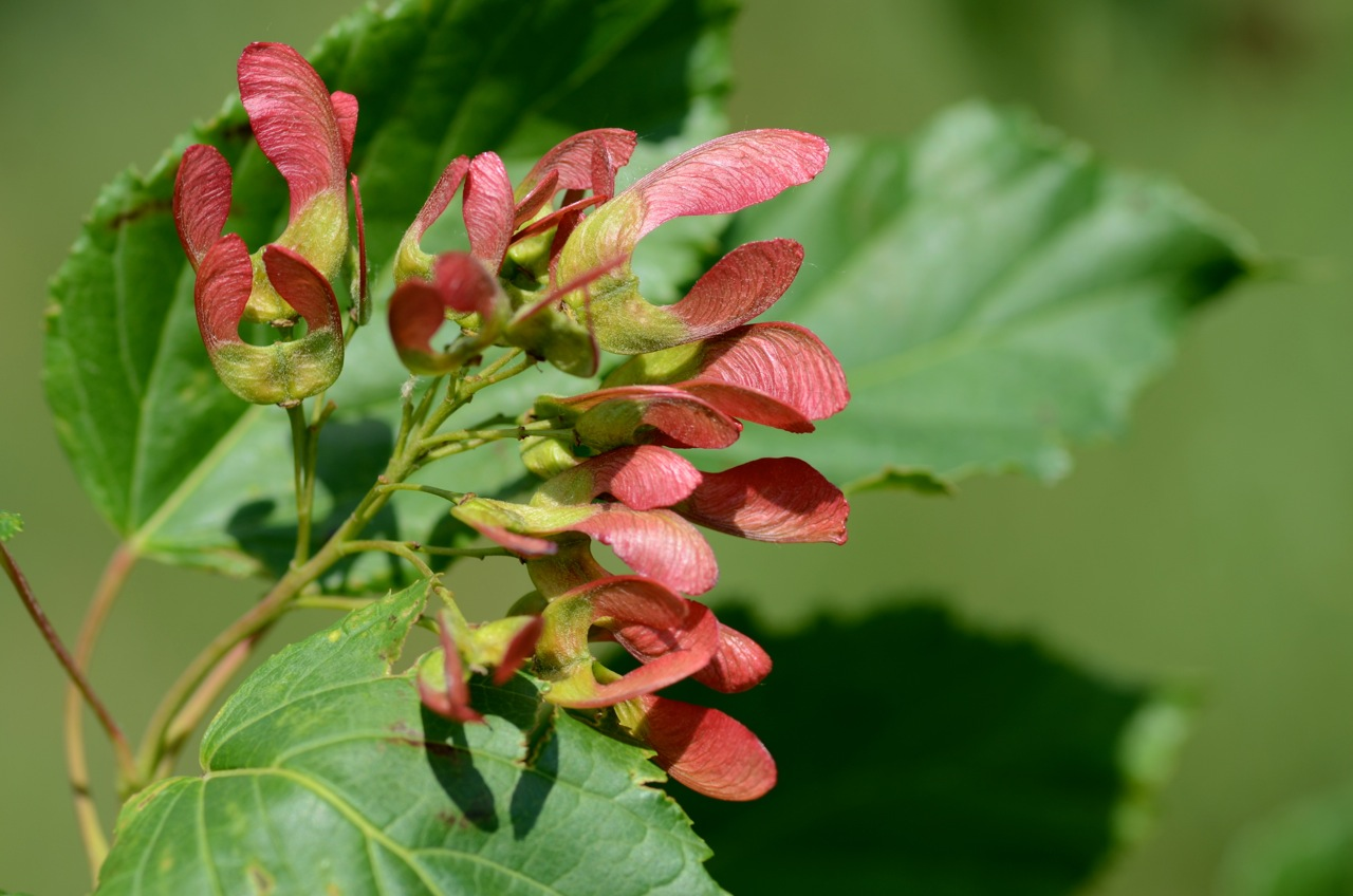 mitten in Wien - II